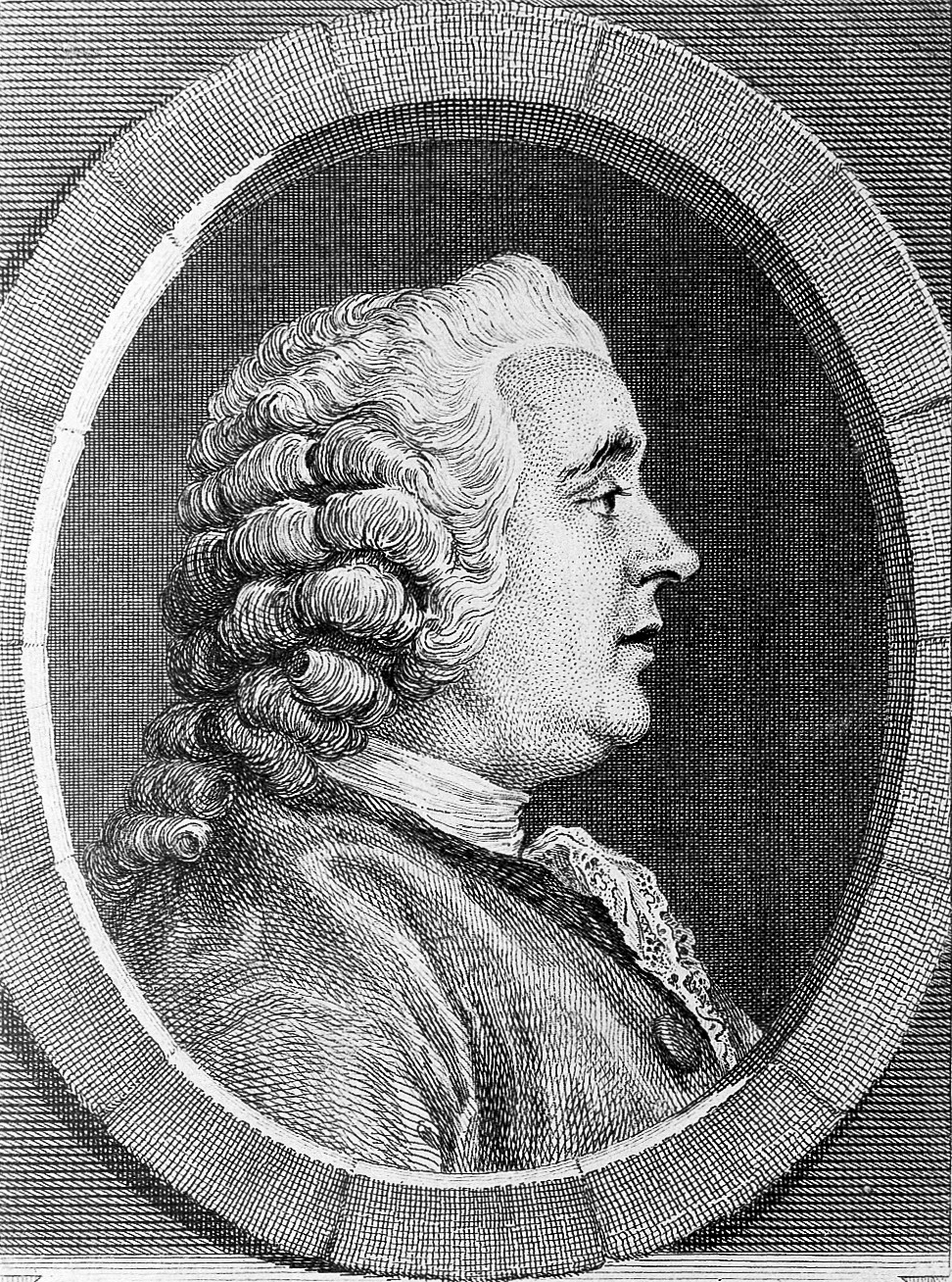 Portrait von A. Ch. Lorry